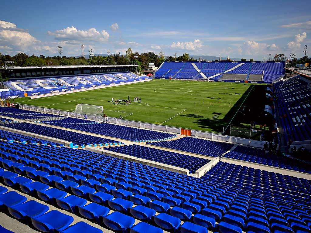 El Estadio Miguel Alemán Valdez Recientemente Remodelado En Celaya